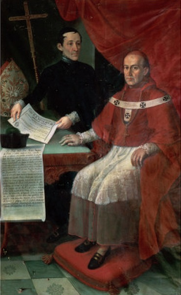 último obispo de Quito (con ese título) entre 1833 y 1849.